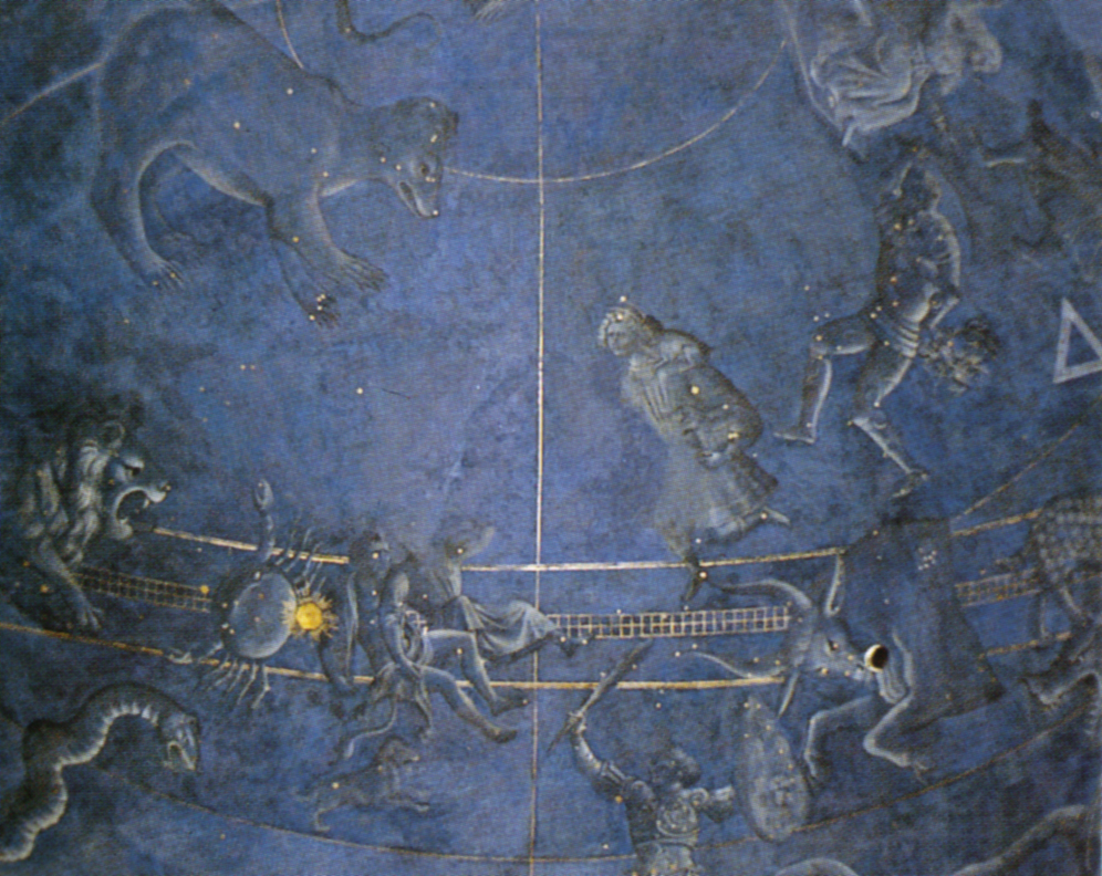 Pesello (attr.) emisfero celeste, 1442 circa, sagrestia vecchia, firenze.jpg